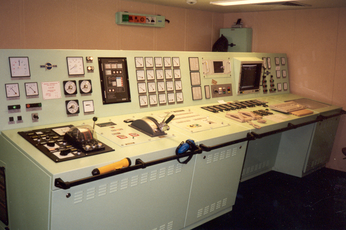 Fahrpult im Maschinenkontrllraum eines Containerschiffes